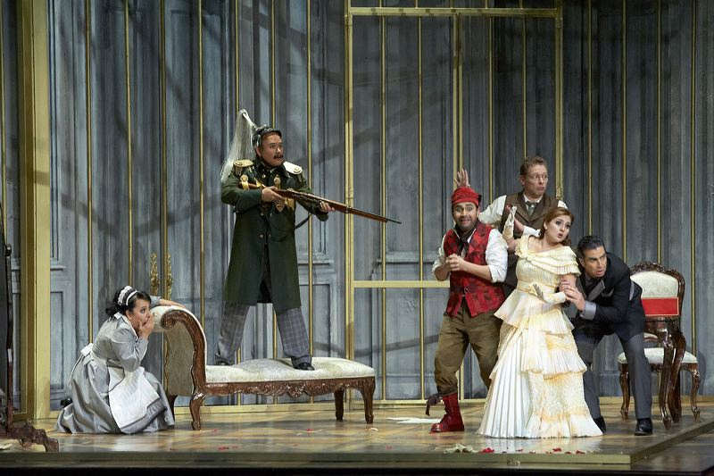 Javier Camarena, tenor, "Conde Almaviva", El Barbero de Sevilla de Rossini, Compañía Nacional de Ópera, Palacio de Bellas Artes, México 2012